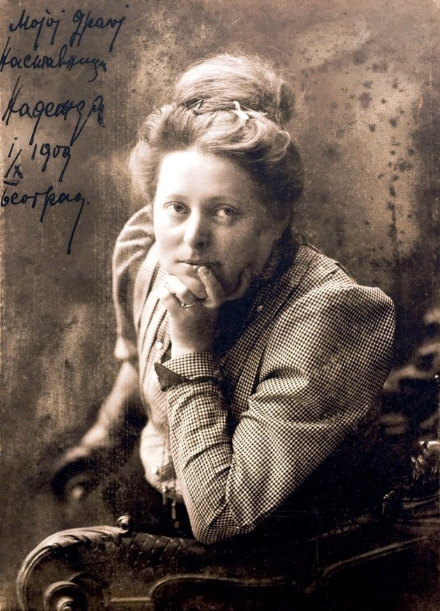 Nadežda Petrović